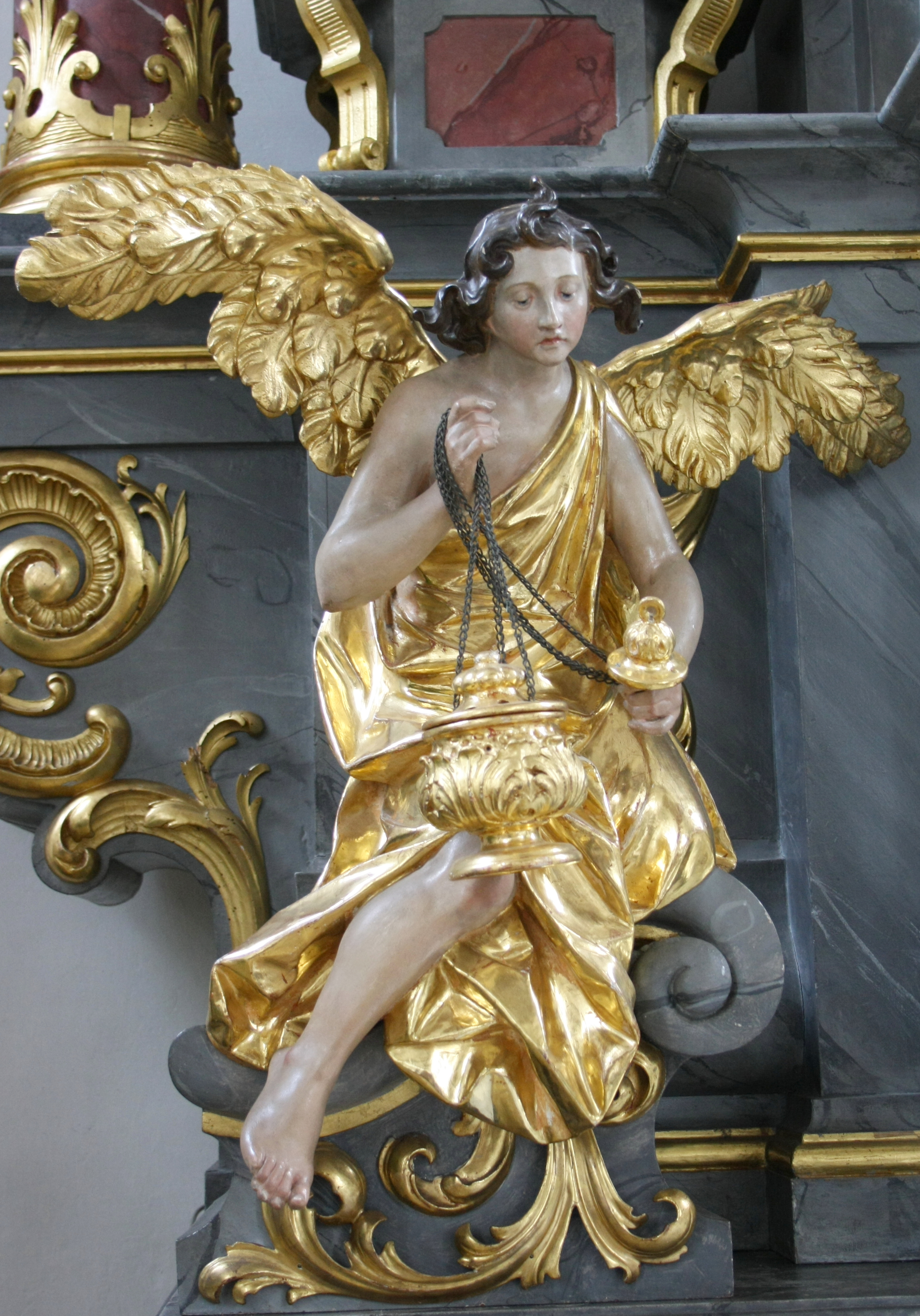 Katholische Kirche St. Andreas in Gremheim, einem Ortsteil von Schwenningen, Engel am Hauptaltar